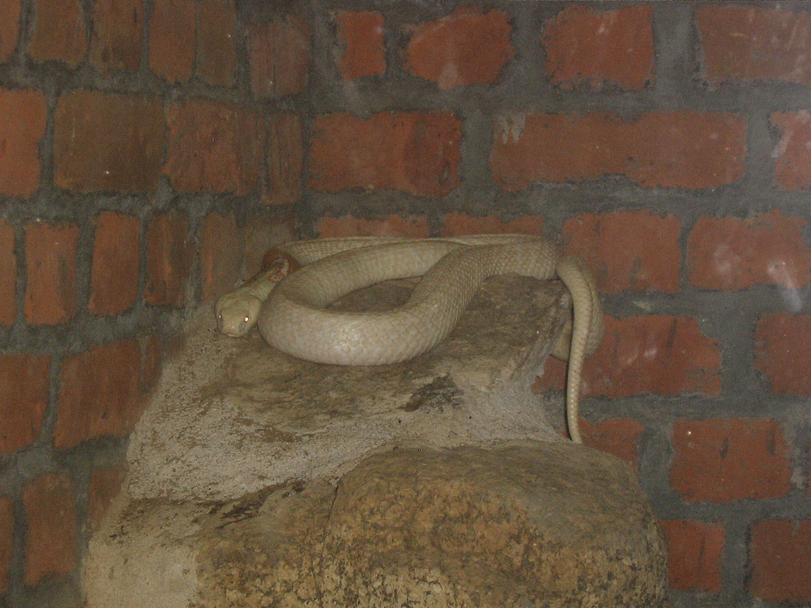 Naja naja